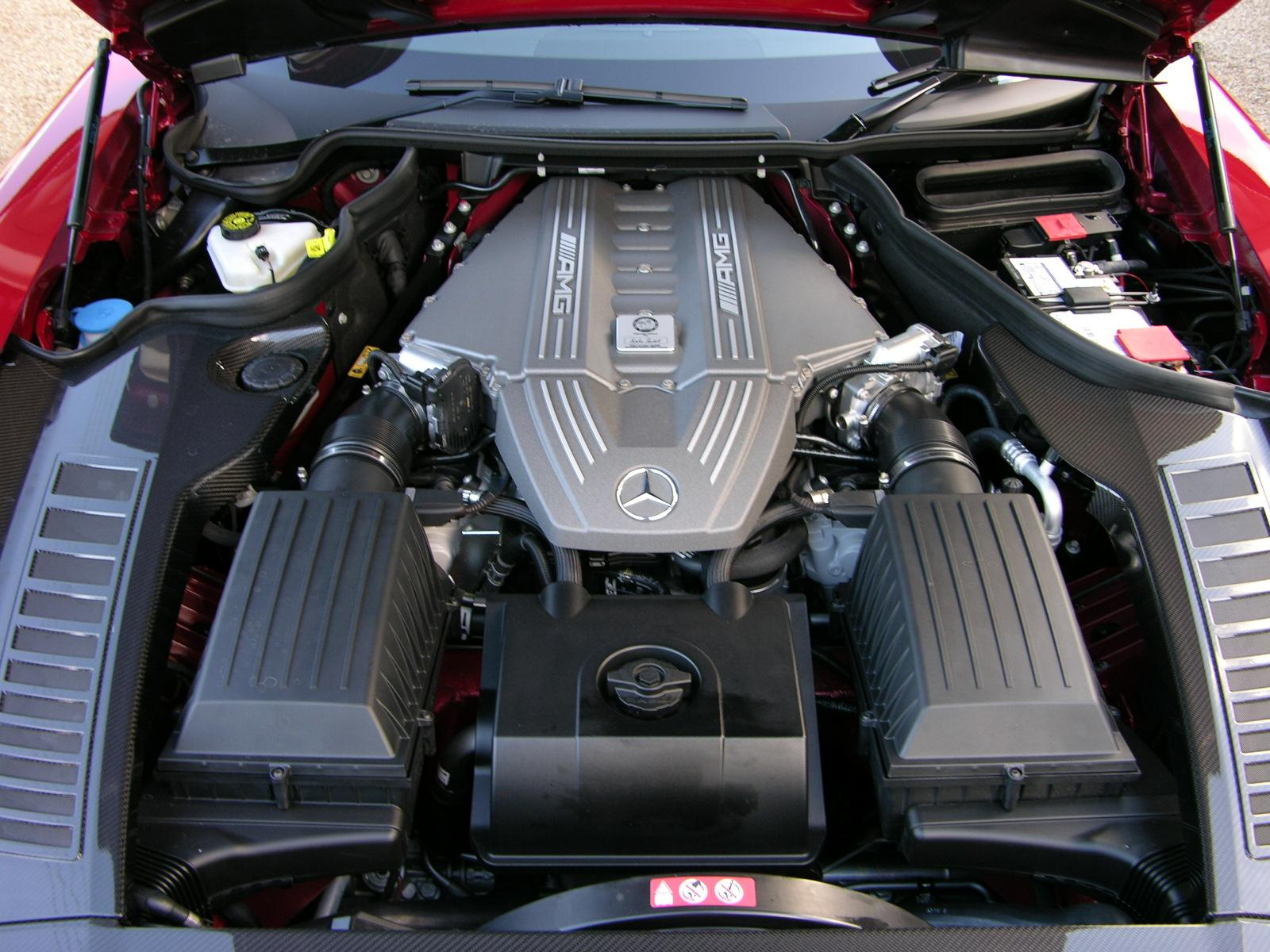 Mercedes Benz SLS AMG